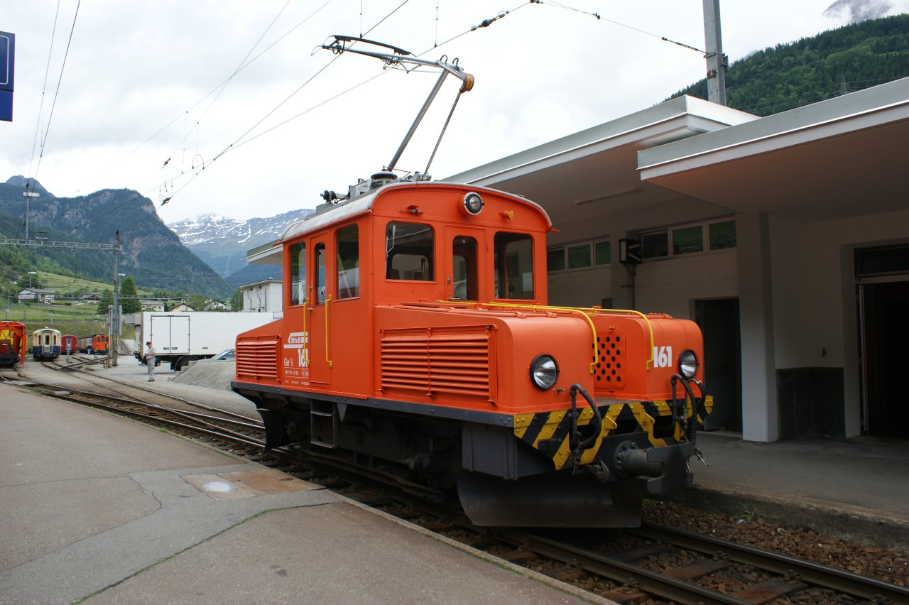 RhB Ge 2/2 161 als Rangierlok in Poschiavo. Die Übergangsbleche an den Durchgängen sind entfernt worden.